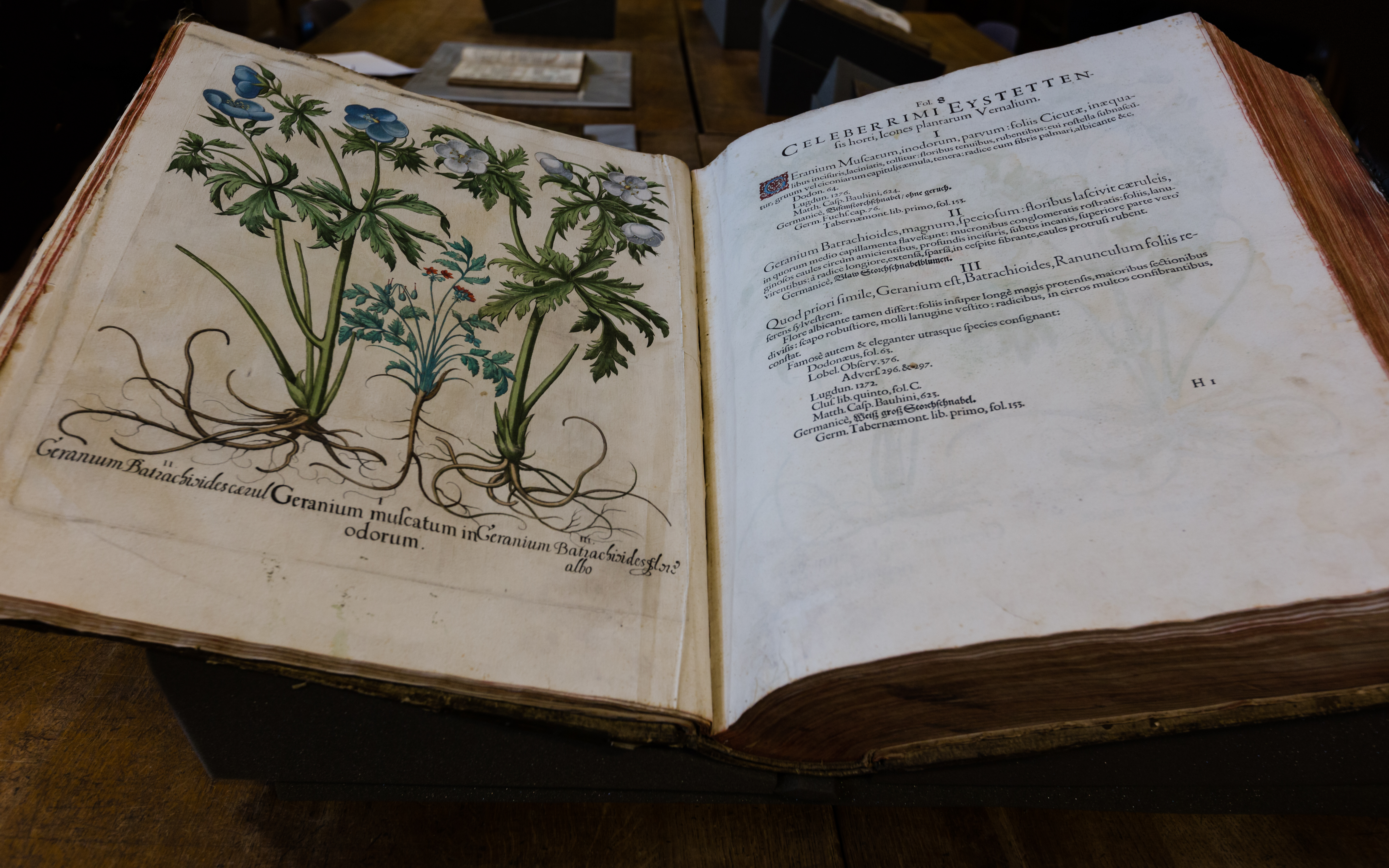 Basilius Besler, Hortus Eystettensis, Nuremberg 1613. Ouvrage illustré de botanique sur papier. Bibliothèque de l'Université de Liège, Wiki Loves Art, Liège, Belgique This is a file created at the museum: Library of Université de Liège